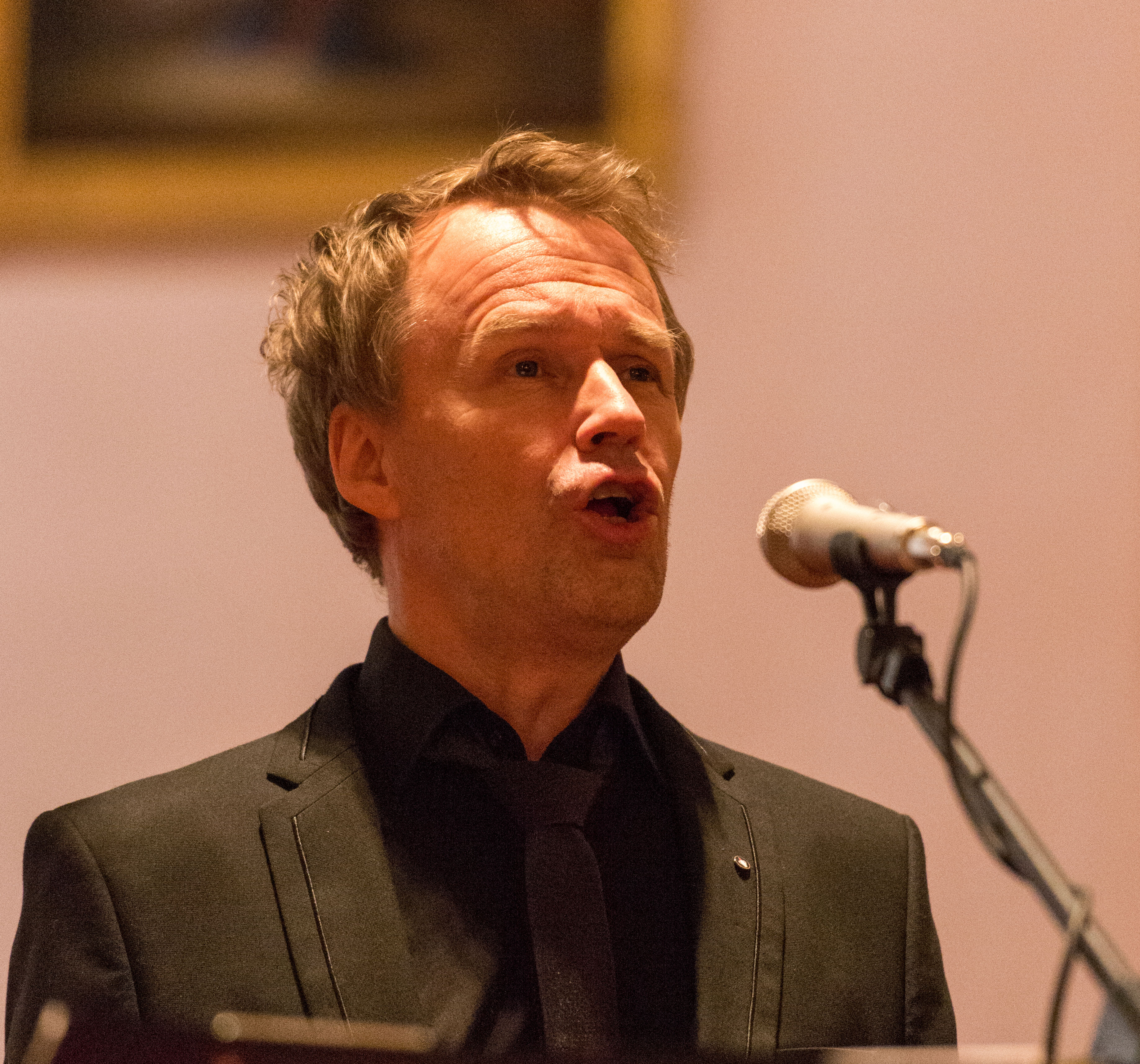 Reijo Ikonen suomalainen tenori